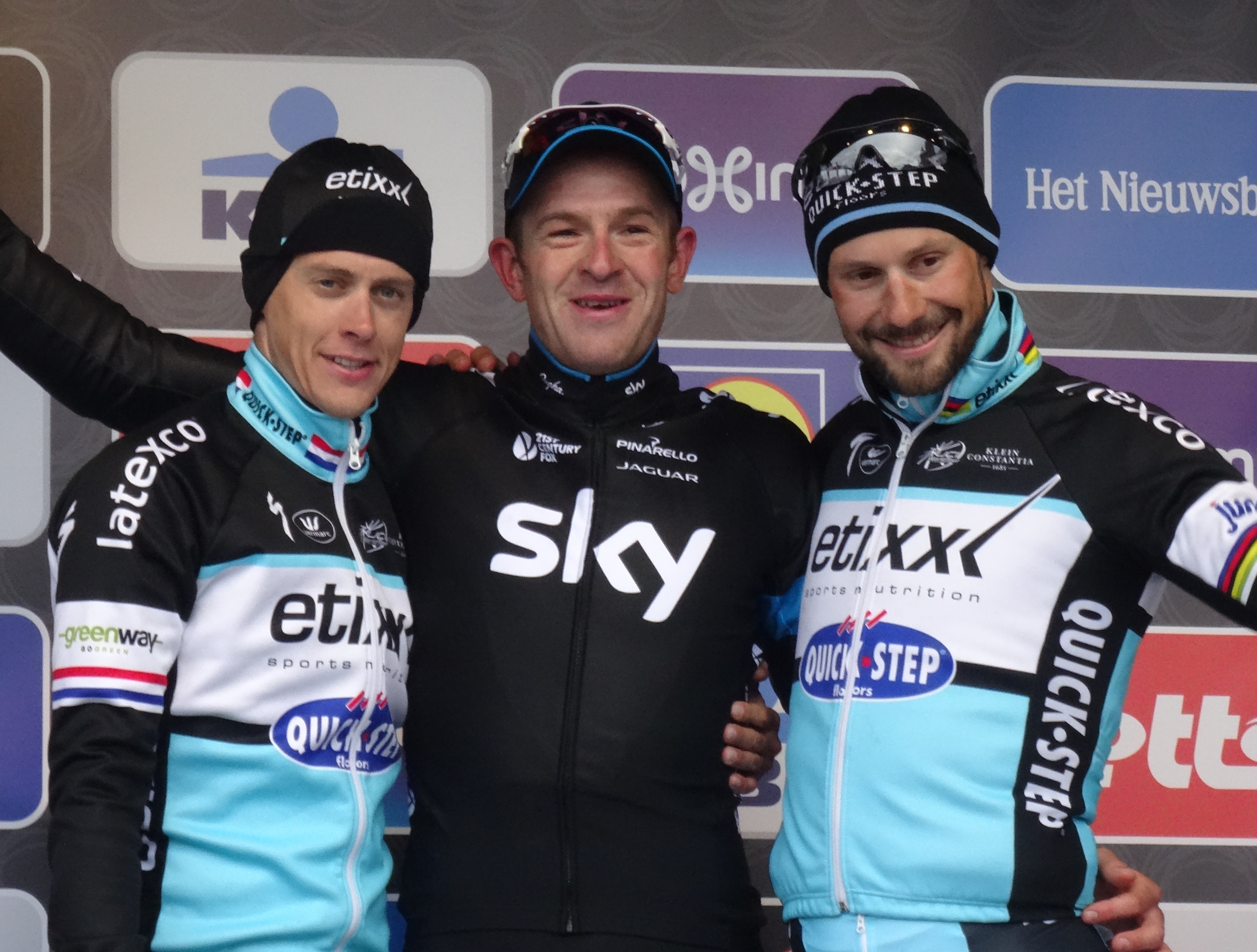 Reportage réalisé le samedi 28 février à l'occasion du départ et de l'arrivée du Circuit Het Nieuwsblad 2015 à Gand, Belgique.